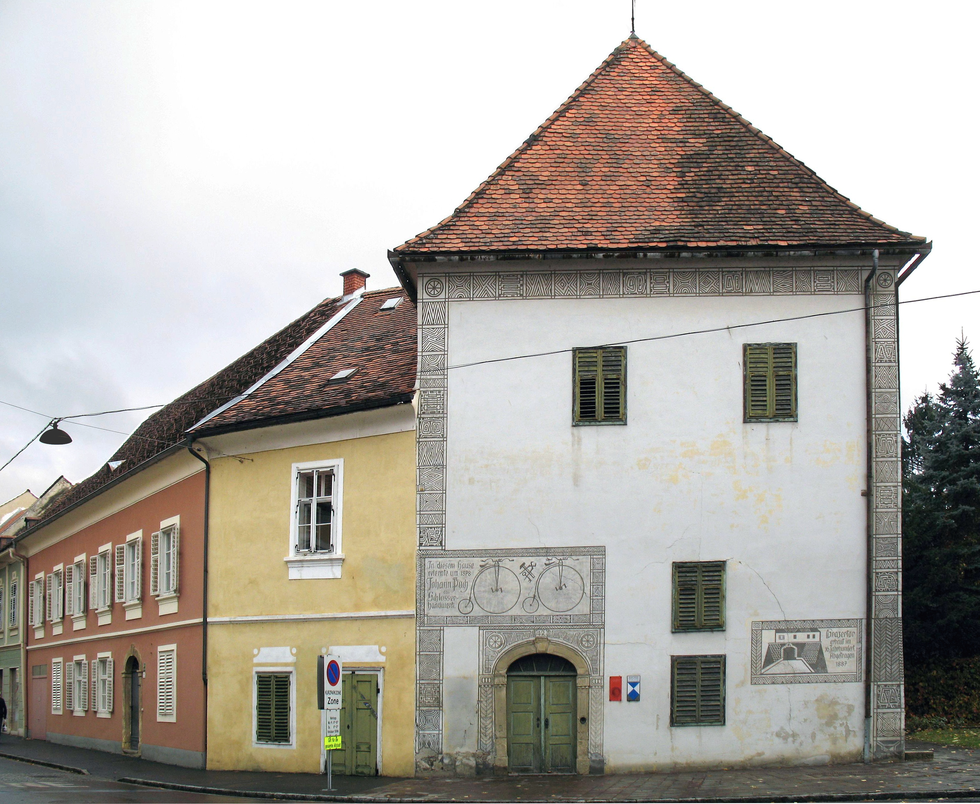 Puch-Gedenkstätte, ehem. Lehrlingswerkstätte von Johann Puch